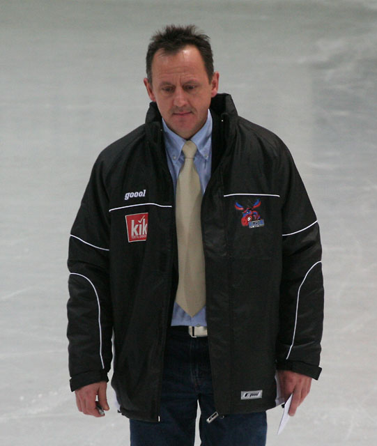 Krystian Sikorski, Trainer des EHC Dortmund in der Saison 2008/09